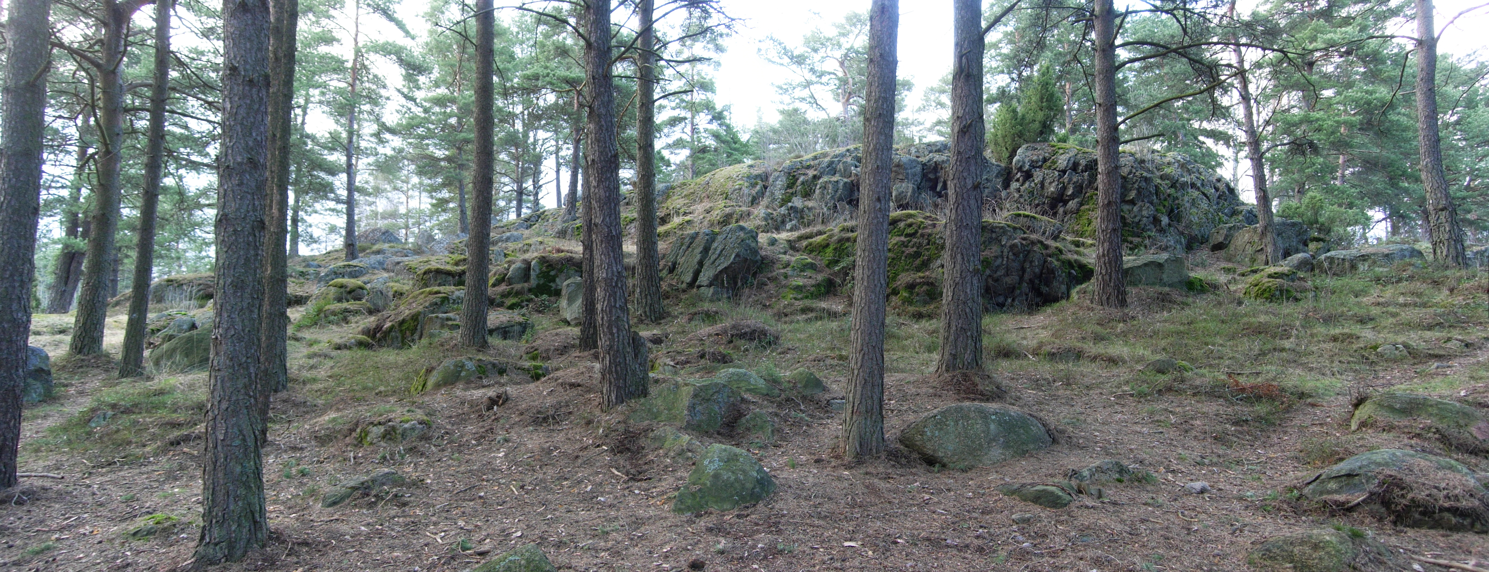 Linnasmäen linnavuori, kuvassa länsirinne. Räntämäki, Turku.